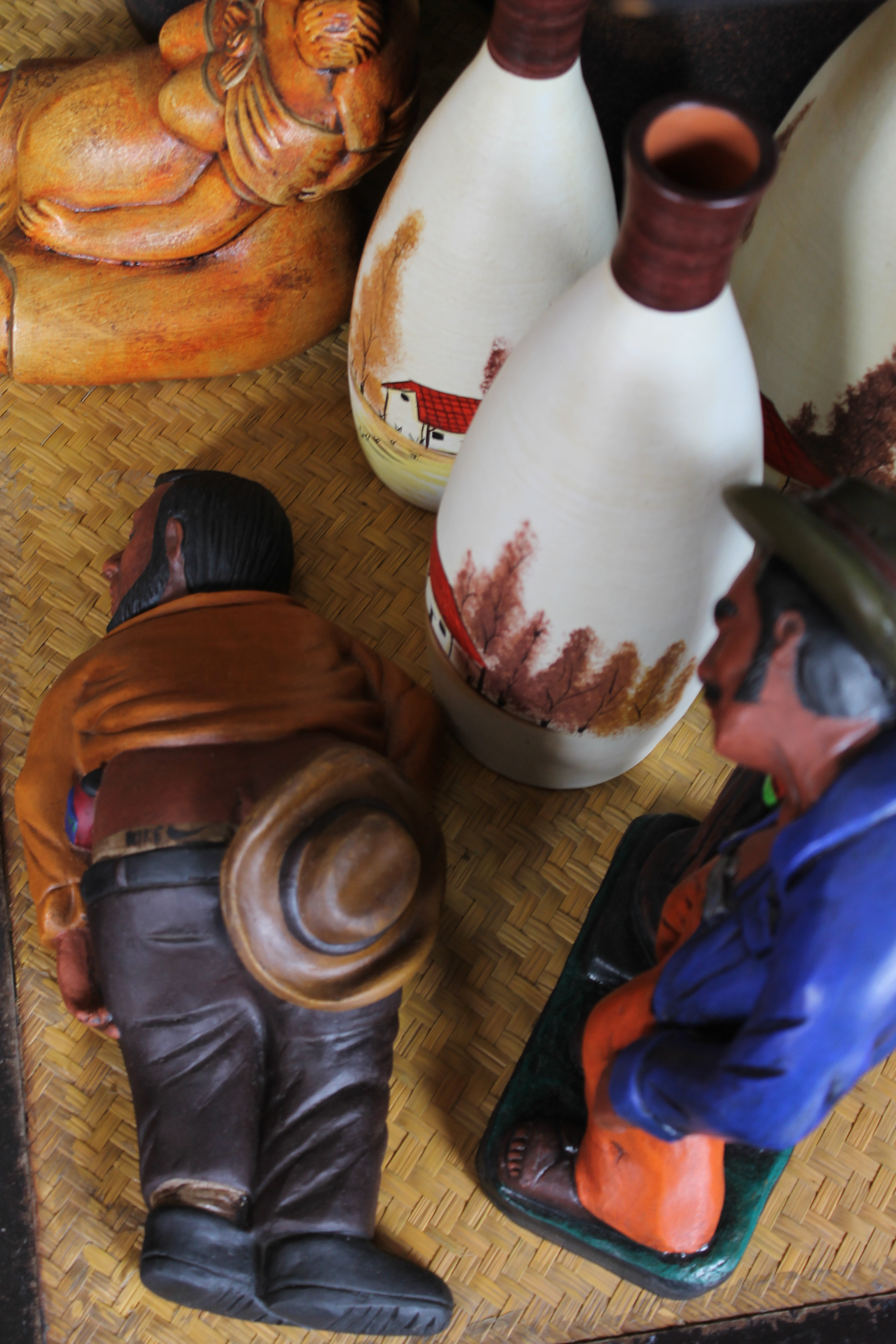 Artesanias de Ilobasco